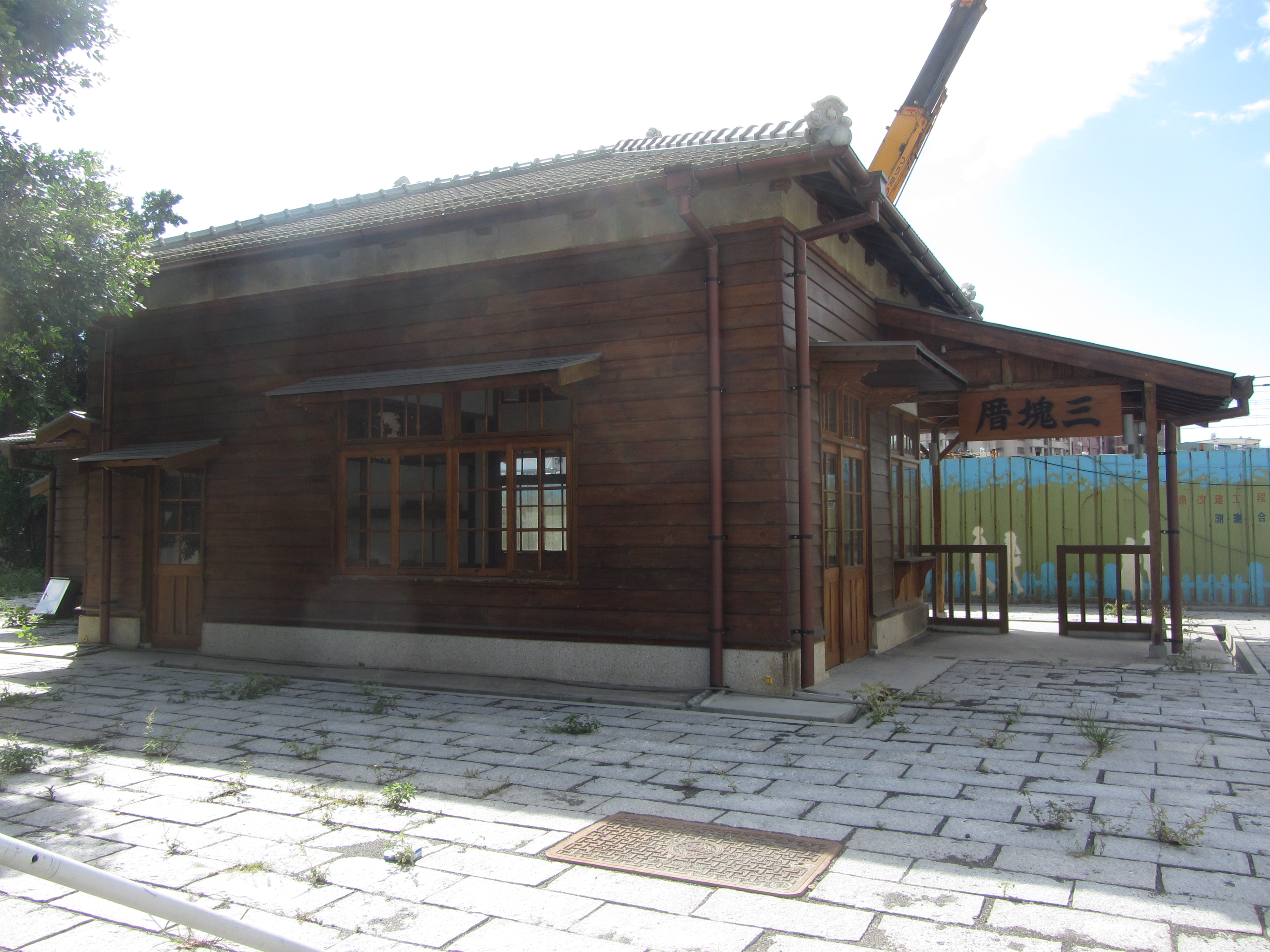 整修中的三塊厝車站